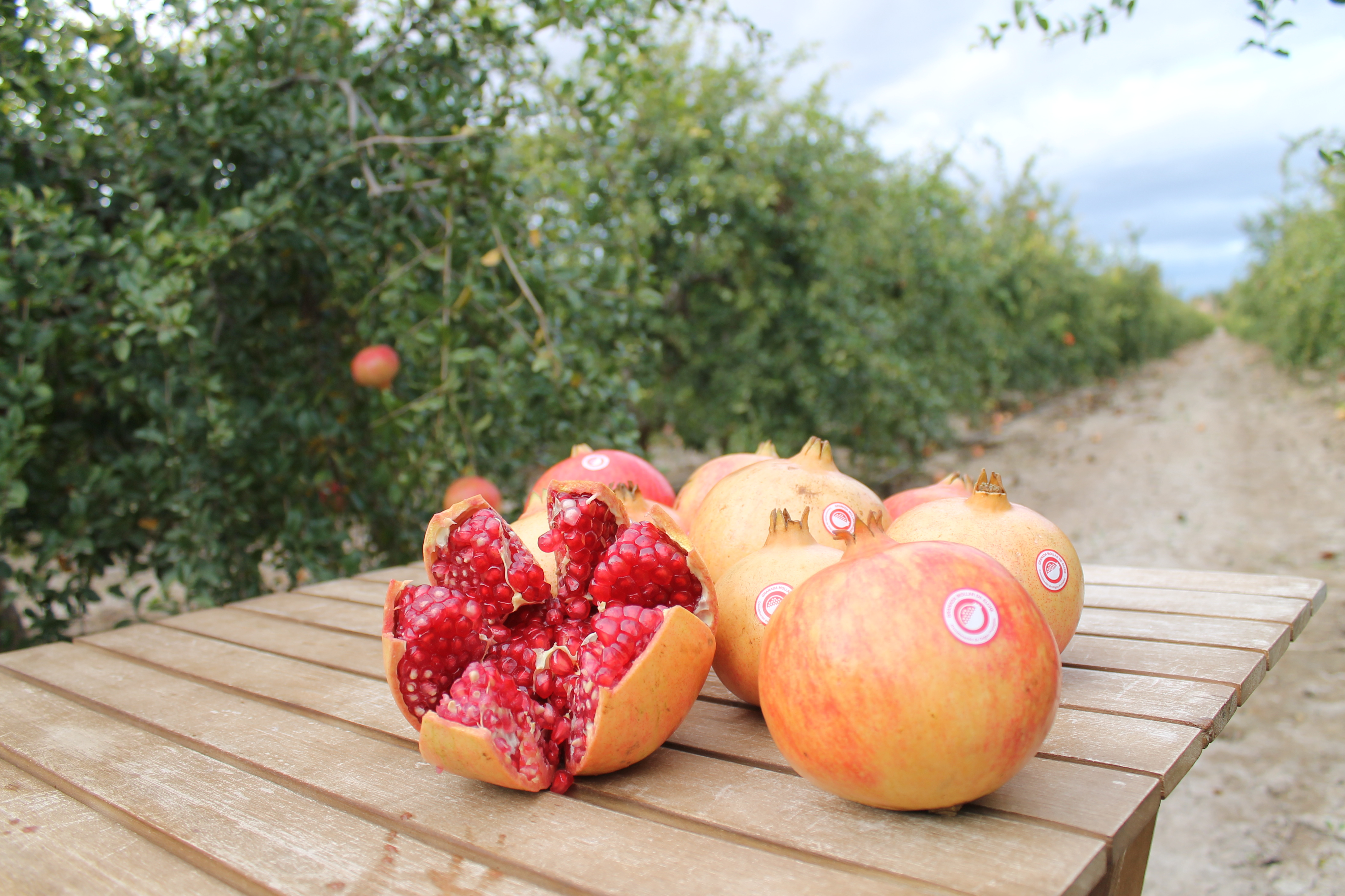 Granadas Mollar de Elche en la tierra conocida como el campo de Europa y que está amparada por la Denominación de Origen Protegida.